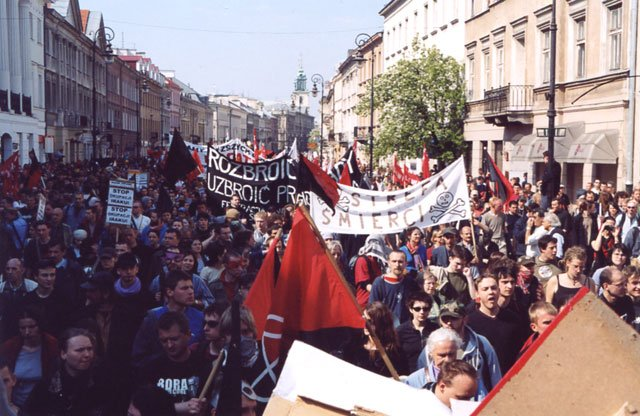 Zdjęcie ze strony skłotu Rozbrat. Za zgodą kolektywu.